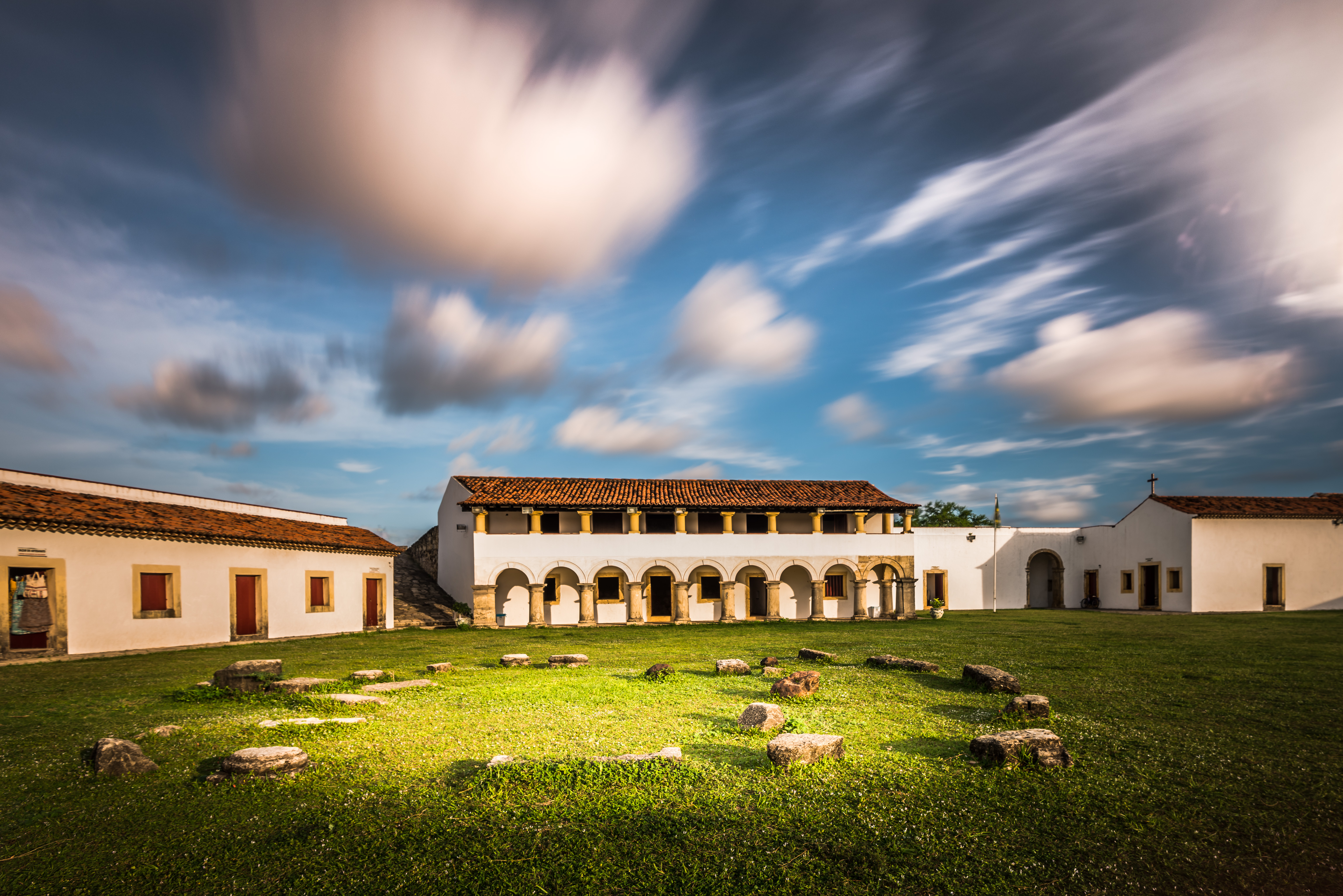 Forte de Santo Antônio da Barra